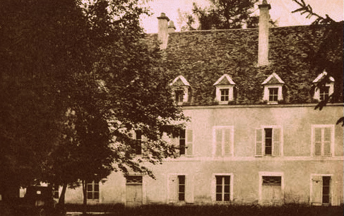 Ce site eu dès le XVIème siècle un haut fourneau appartenant à l'abbaye Notre Dame, il fut propriété des Cailletet entre 1834 et 1886, avant de devenir une laiterie puis un demeure d'un particulier.